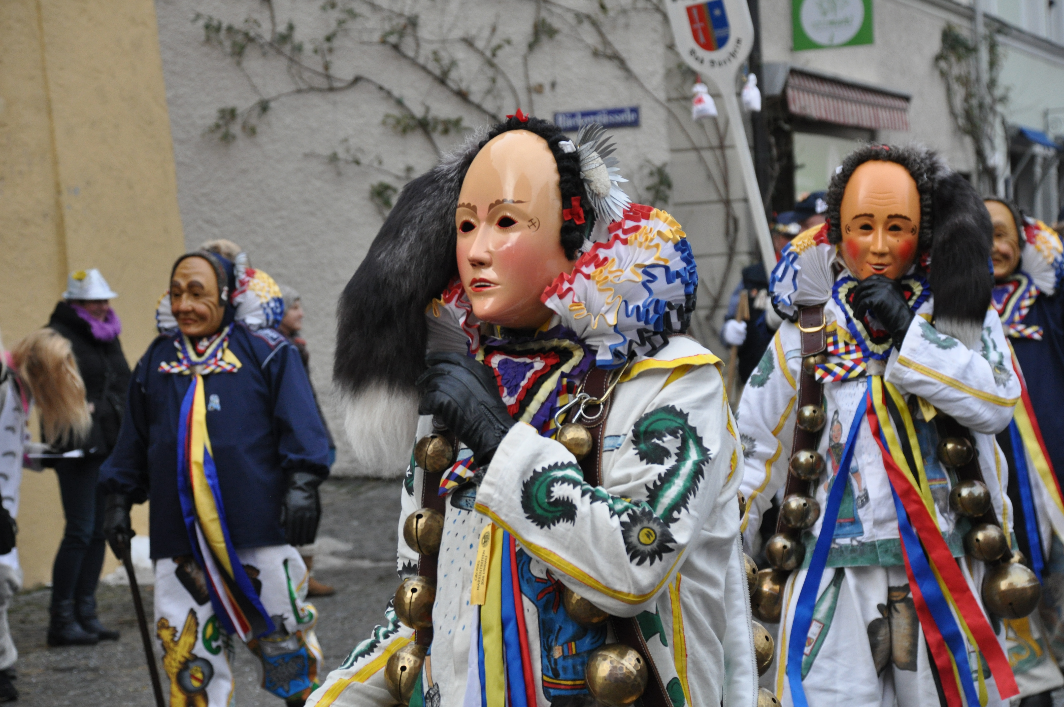 Narrenzunft Bad Dürrheim; Narrenfigur: Narro Fotografiert beim Großen Narrentreffen der Vereinigung Schwäbisch-Alemannischer Narrenzünfte (VSAN) in Lindau; Narrensprung am Sonntag, 24. Januar 2016.